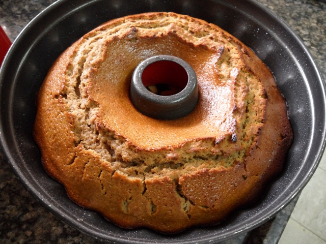 עוגת דבש Honey Cake